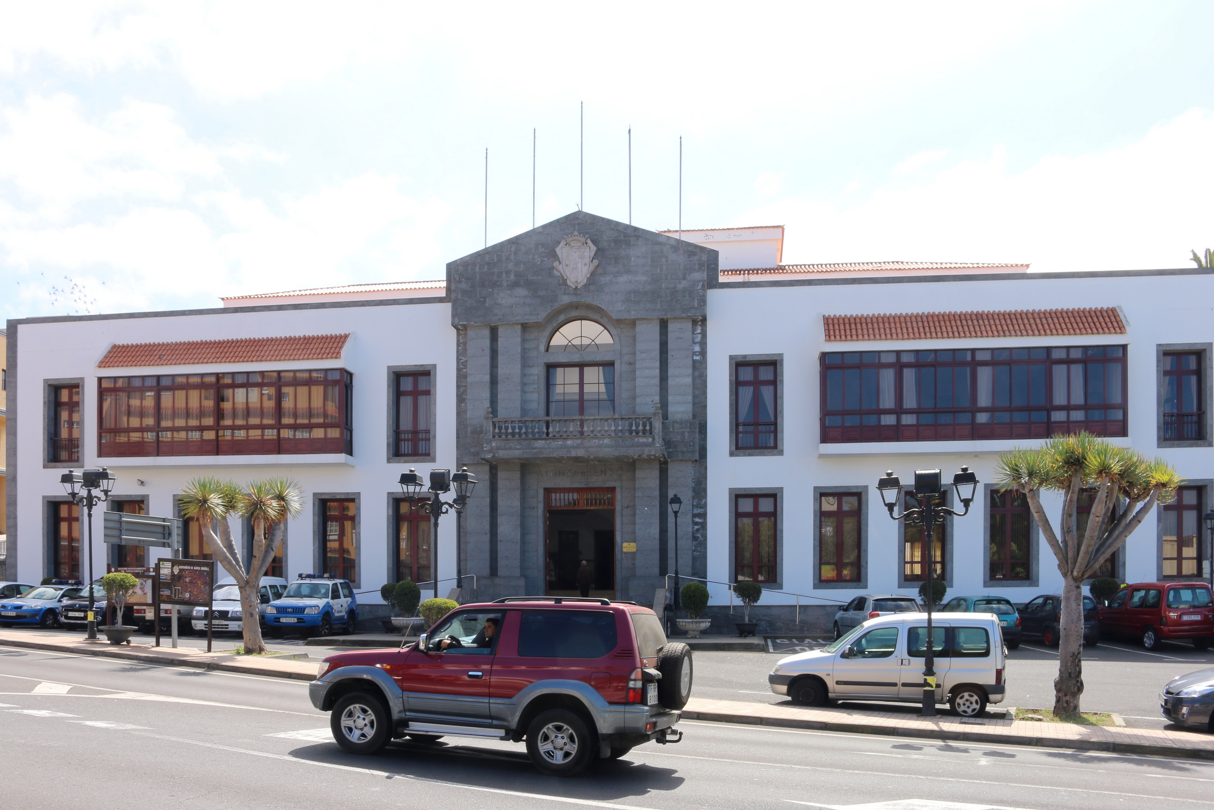 Santa Úrsula, Teneriffa: Ayuntamiento de Santa Úrsula